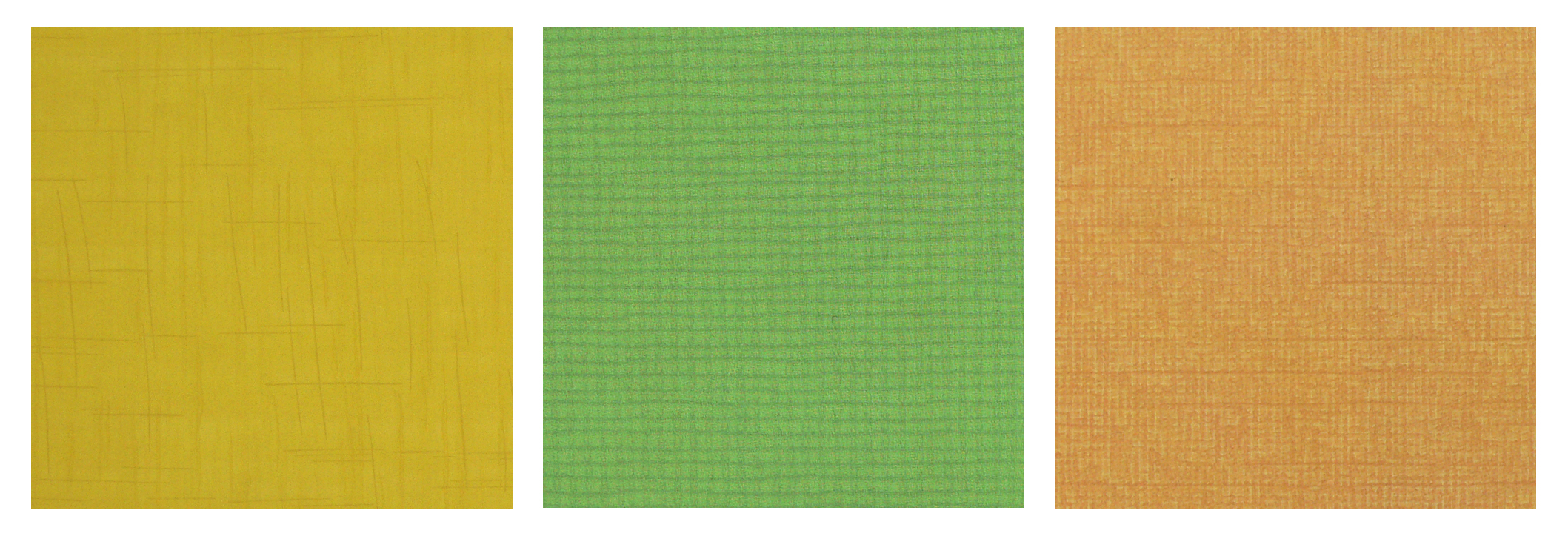 Drei Bauhaus-Taptenmuster, links b 4, in der Bauhaus Ausstellung im Niedersächsischen Landtag